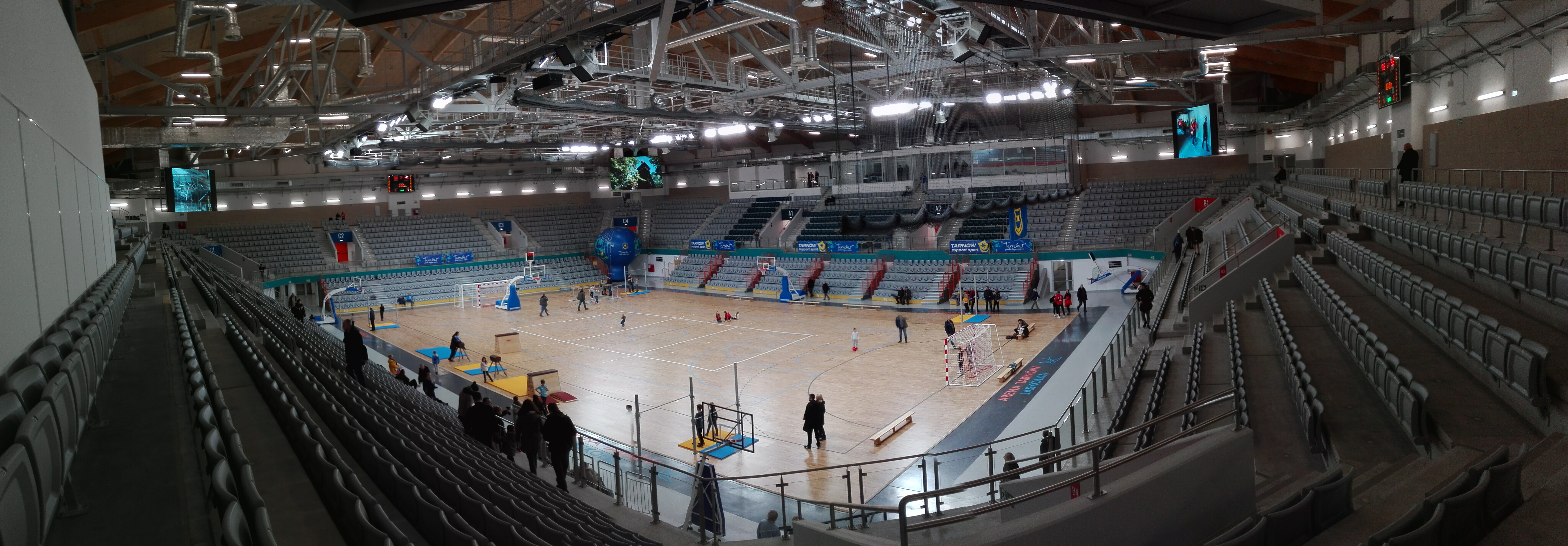 hala w Tarnowie